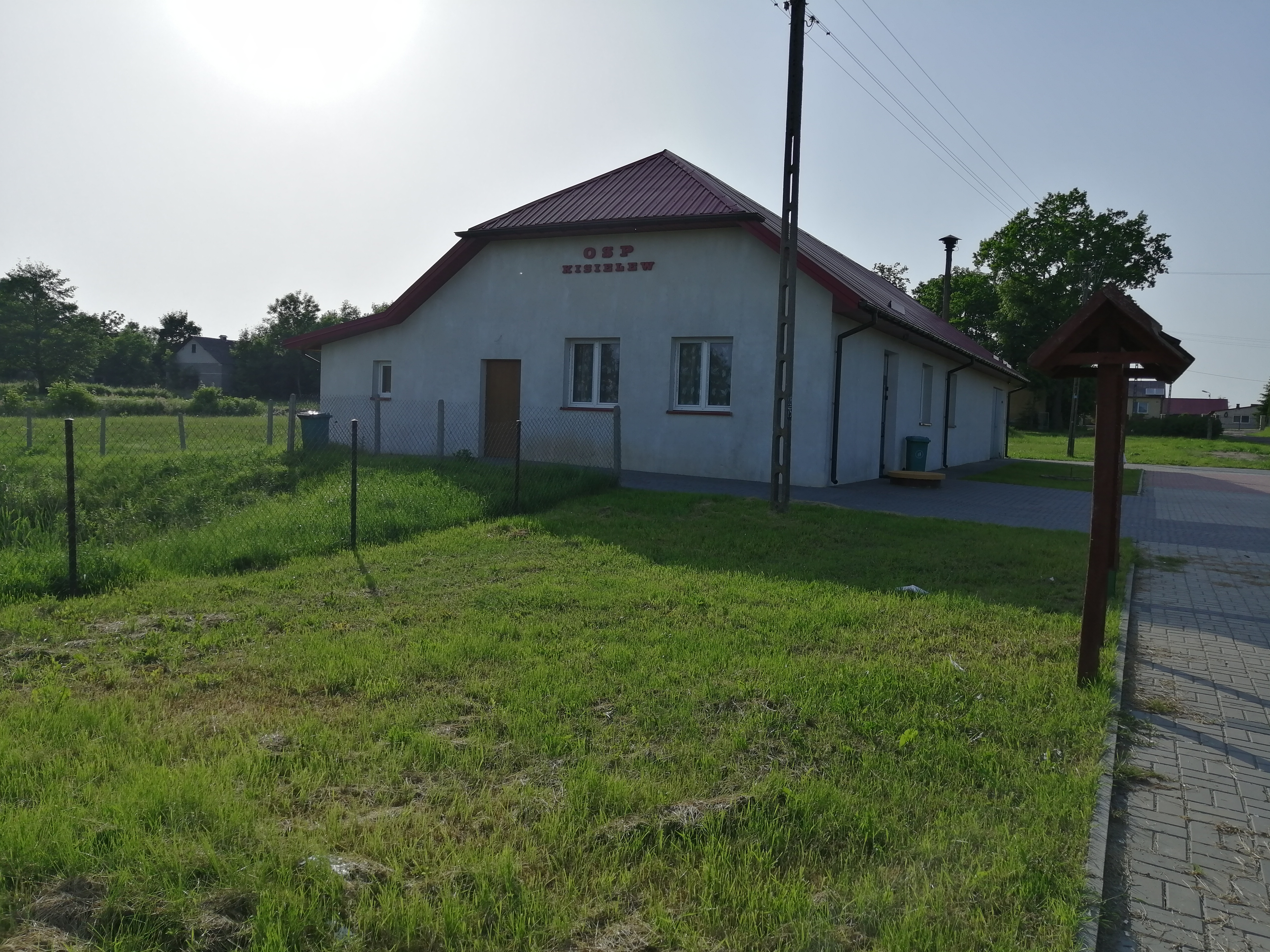 Budynek ochotniczej straży pożarnej w Kisielewie